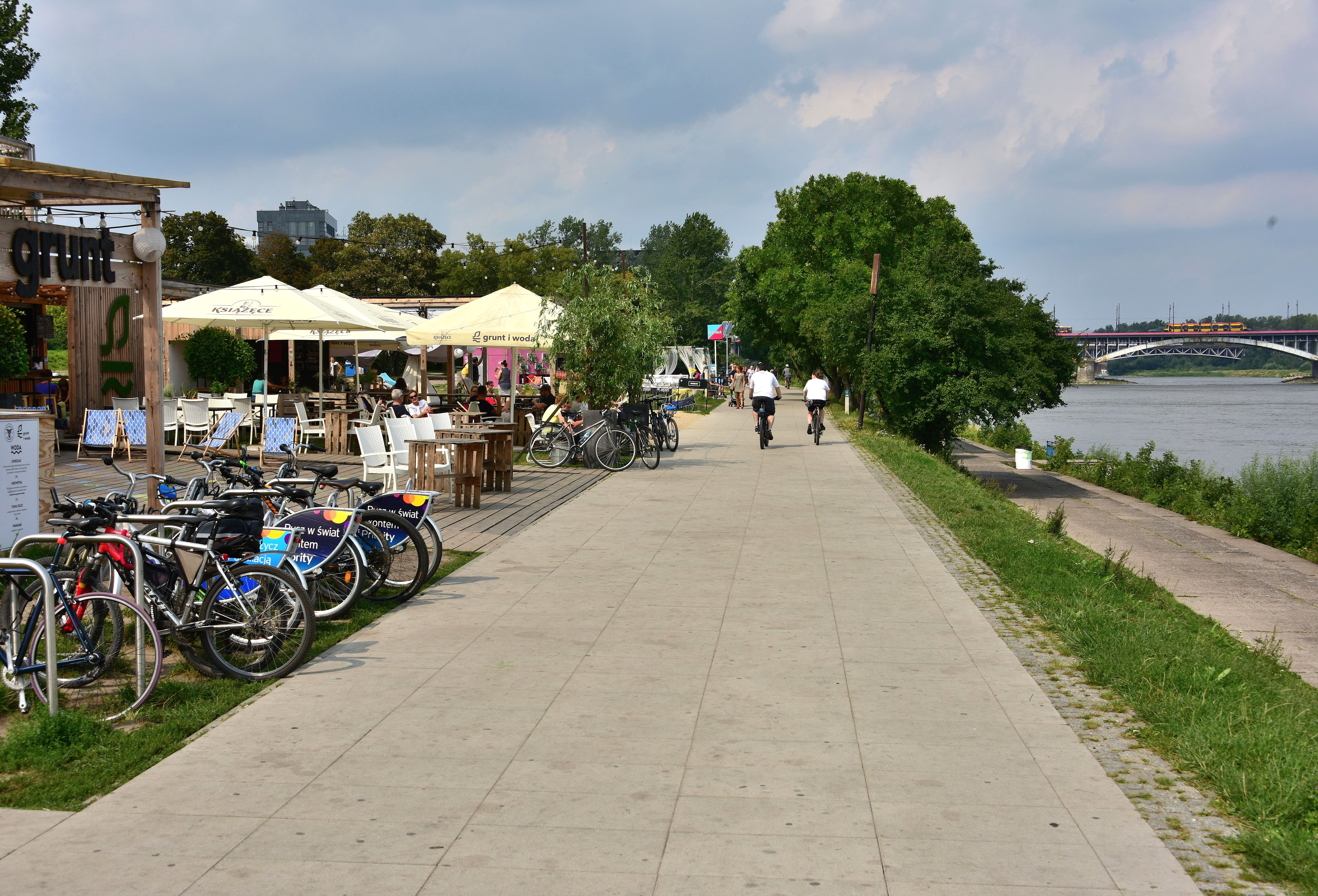 Bulwary wiślane w Warszawie w pobliżu Portu Czerniakowskiego